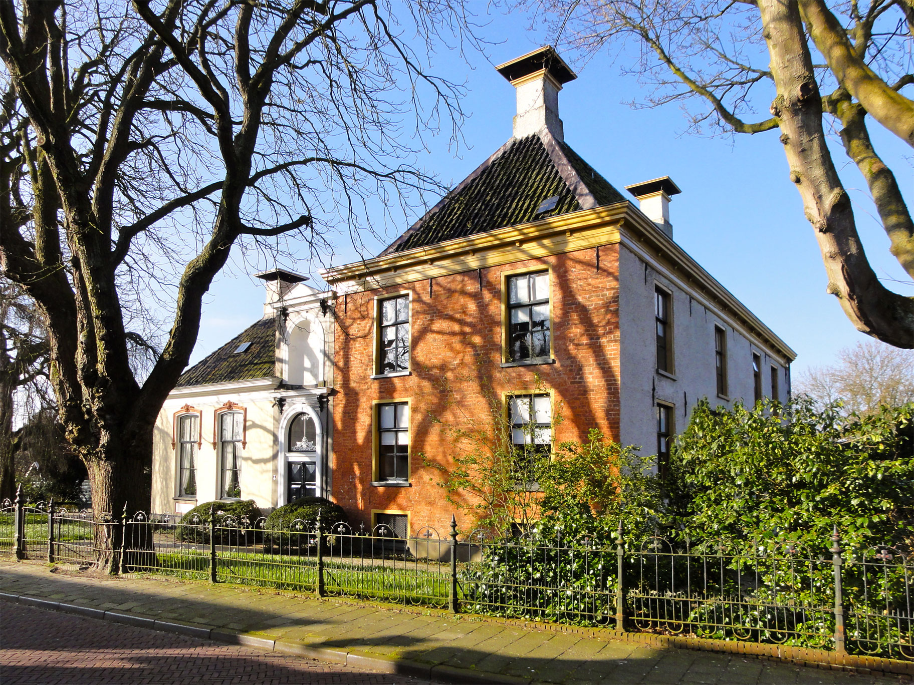 Hervormde pastorie Pastorieweg 24 Warffum